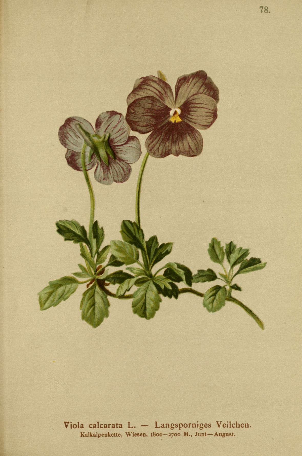 78. Viola calcarata L. -- Langsporniges Veilchen. Kalkalpenkette, Wiesen, 1800—2700 M., Juni— August.